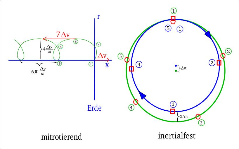 Tangentiales Bahnmanöver